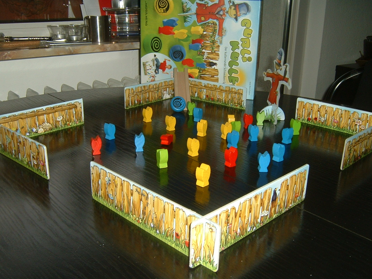 Kinderspiel Curli Kuller von Marco Teubner, 2008 (Nominierungsliste Kinderspiel des Jahres 2009)